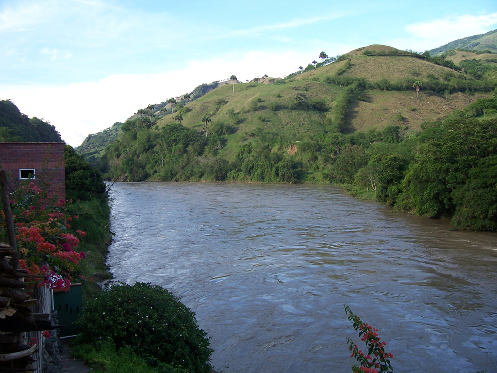 Rio Cauca a su paso por Quinchia Risaralda, Colombia